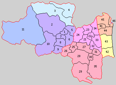 宮城県刈田郡、伊具郡、亘理郡の町村。